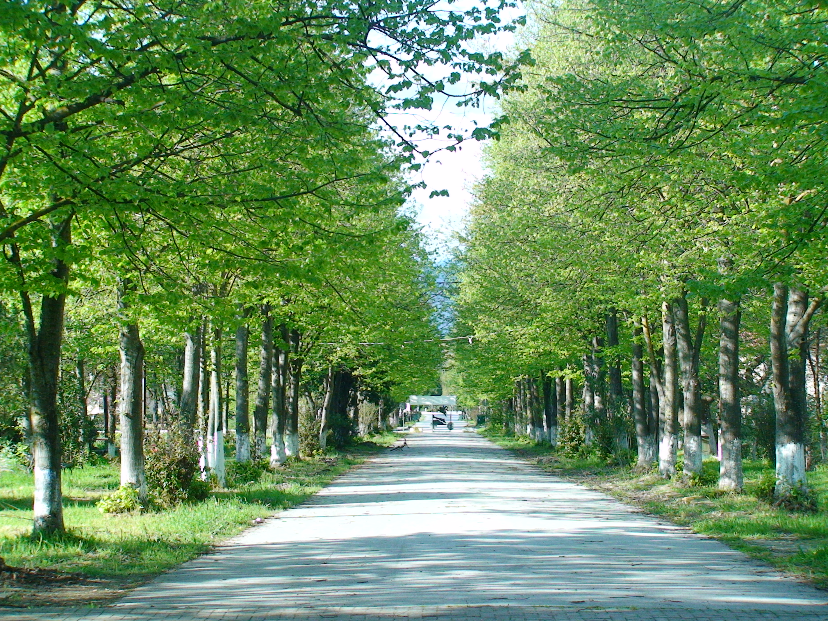 nea madytos pedestrian street